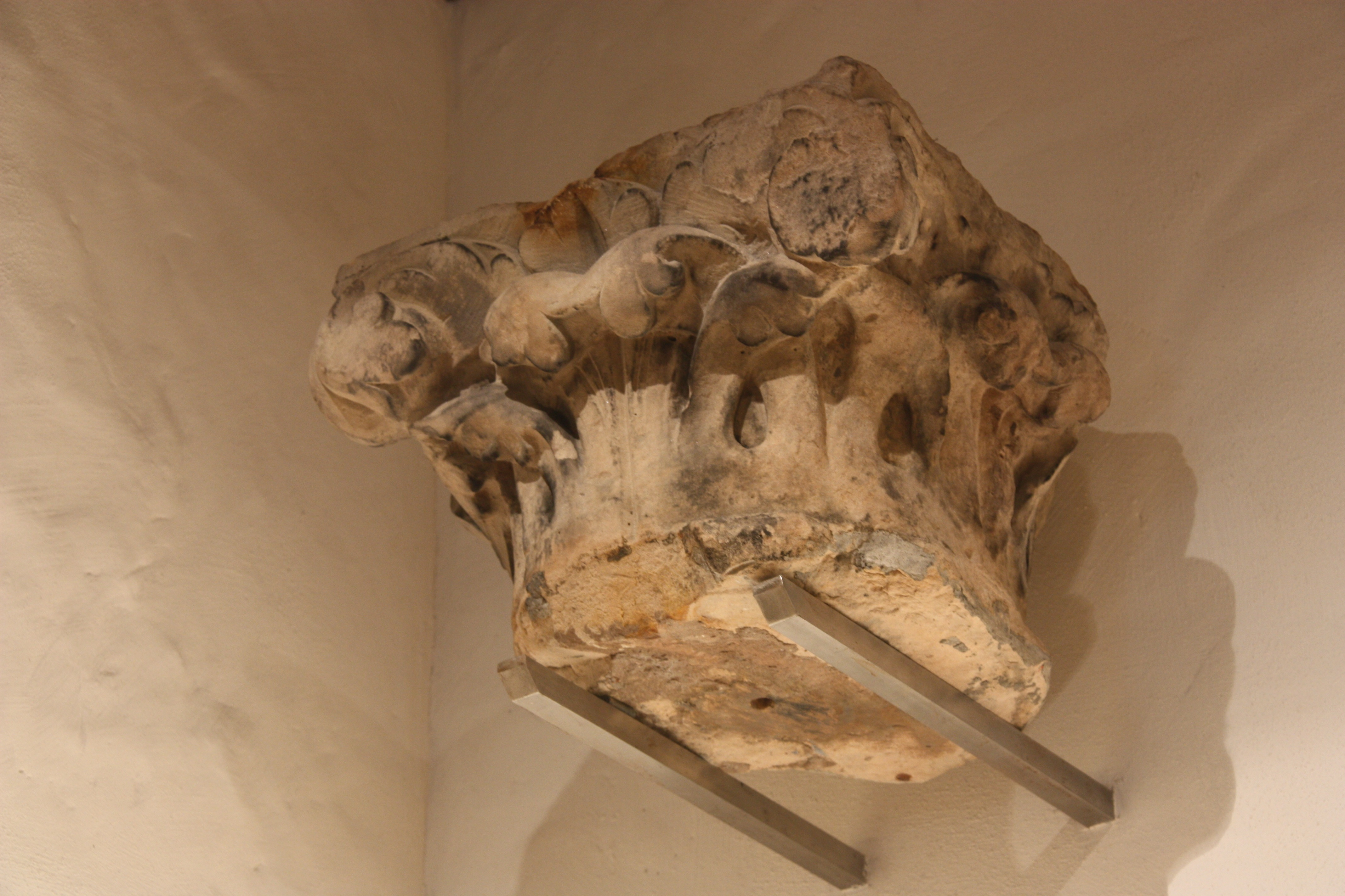 Johanniskloster, Säulenkapitell aus dem zweiten Bau. Aus der Ausstellung des Museums für hamburgische Geschichte.